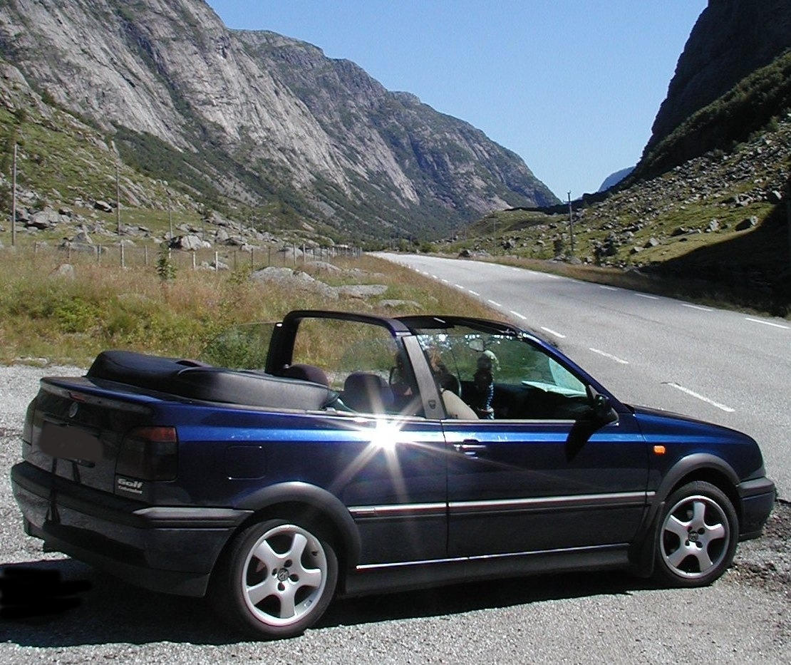 VW Golf III Cabrio in Norwegen, selbst fotografiert 7/2006 durch Kantor.JH